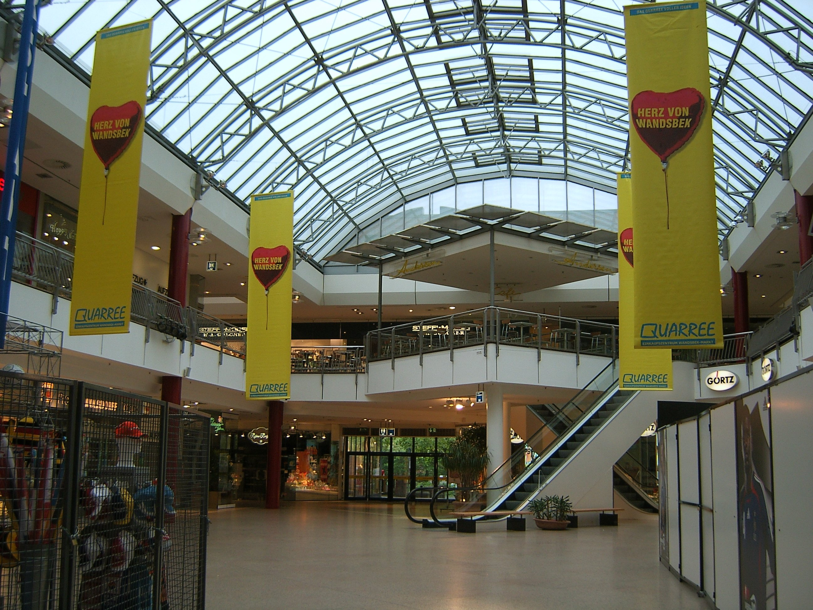 Einkauszentrum „Quarree“ in Wandsbek